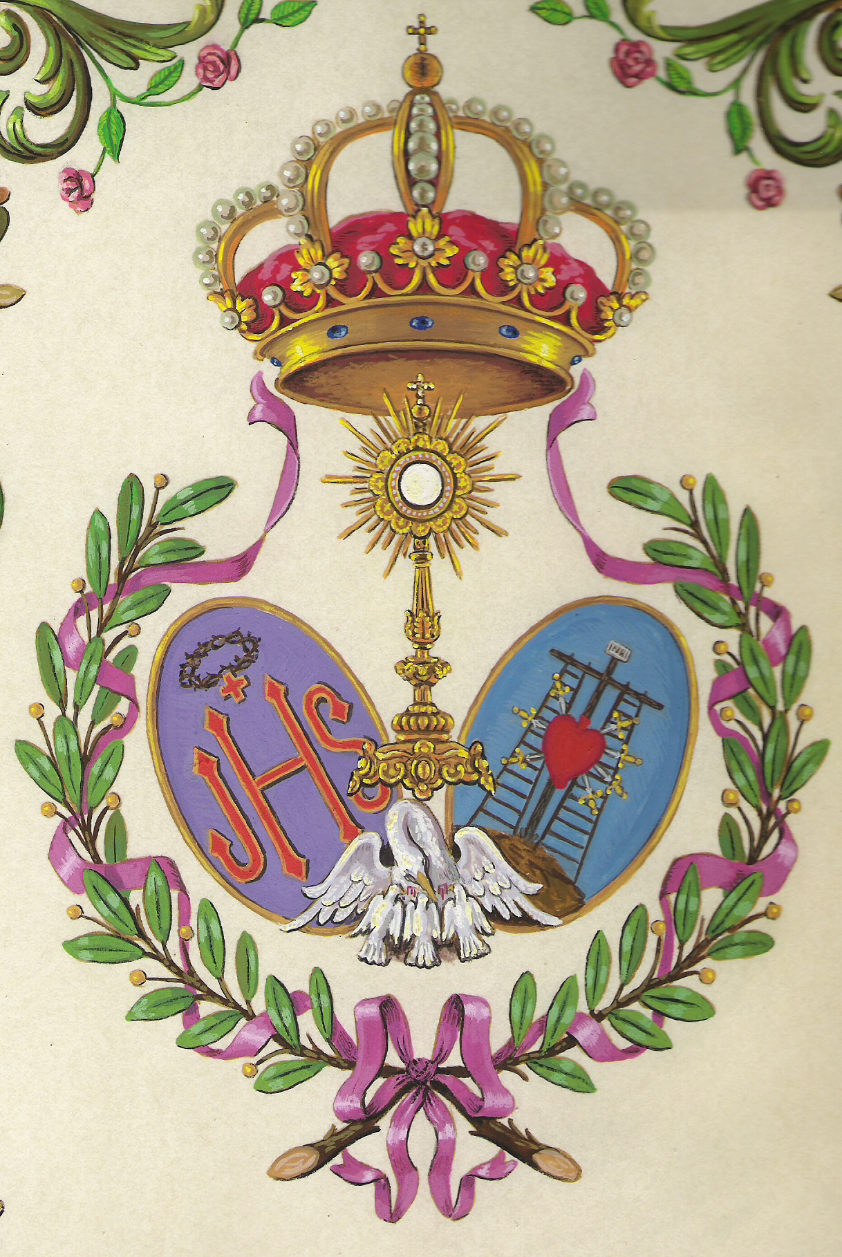 Escudo de la Hermandad de los Dolores del Viso del Alcor.